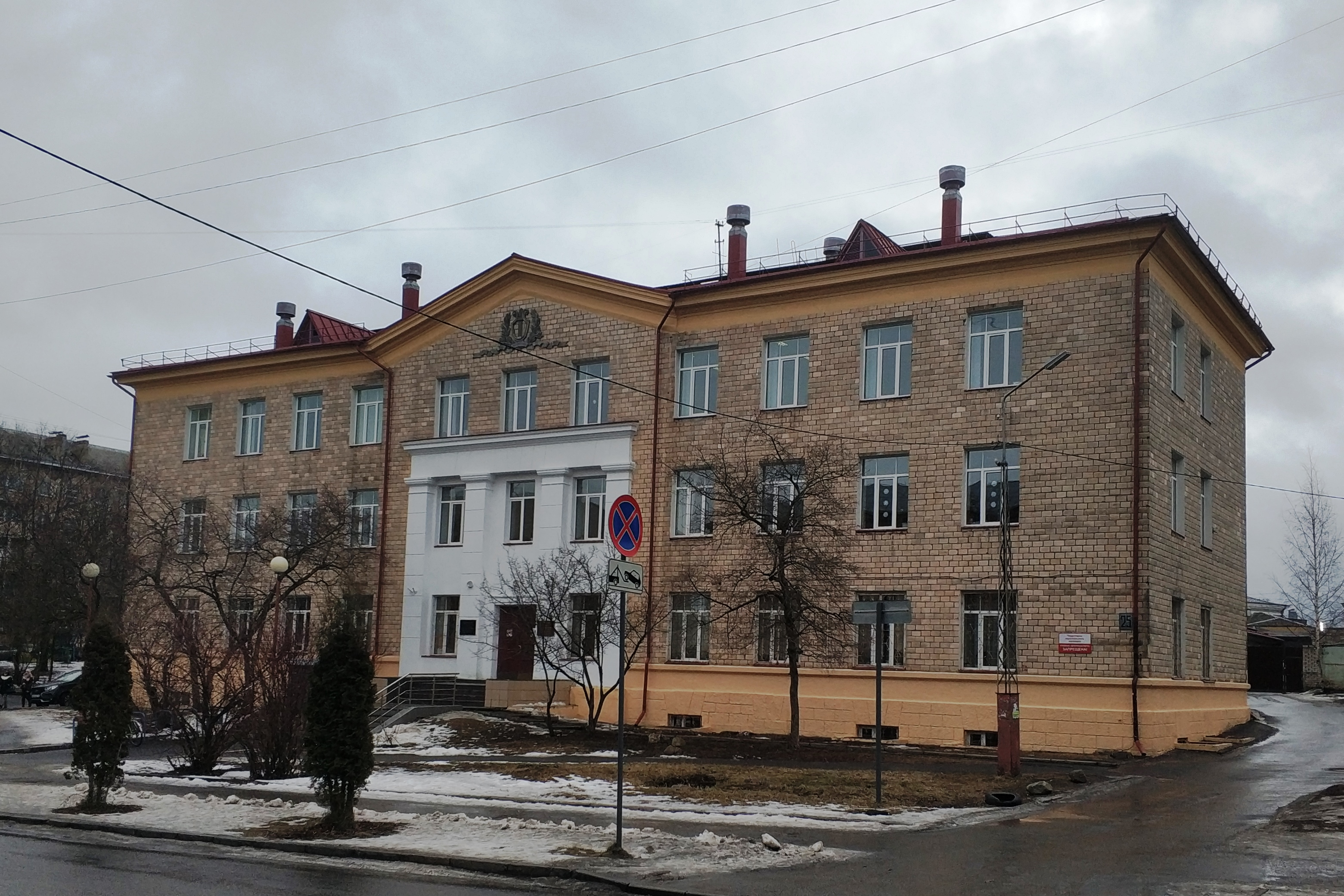 Здание музыкального училища им. К.Э.Раутио в Петрозаводске на ул. Свердлова, д. 25. Архитектор Рудаков Леонид Ефимович.